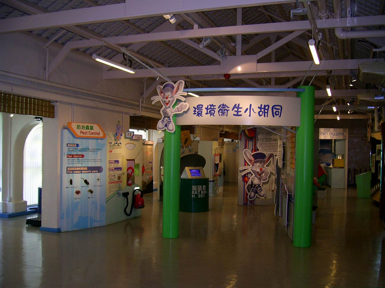 中文（香港）: 衛生教育展覽及資料中心環境衛生小胡同